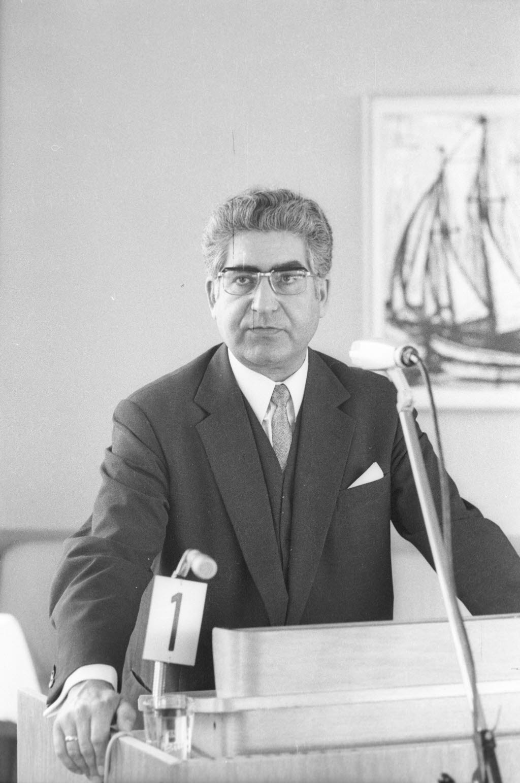 auf der Mitgliederversammlung des Deutschen Anwaltsvereins, wo er über seine geplante Justizreform spricht.